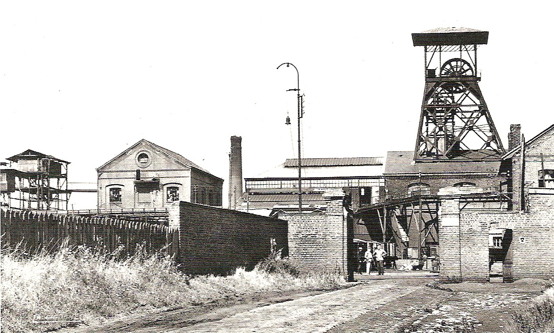 Fosse Blignières à Wavrechain en service de 1893 à 1955.